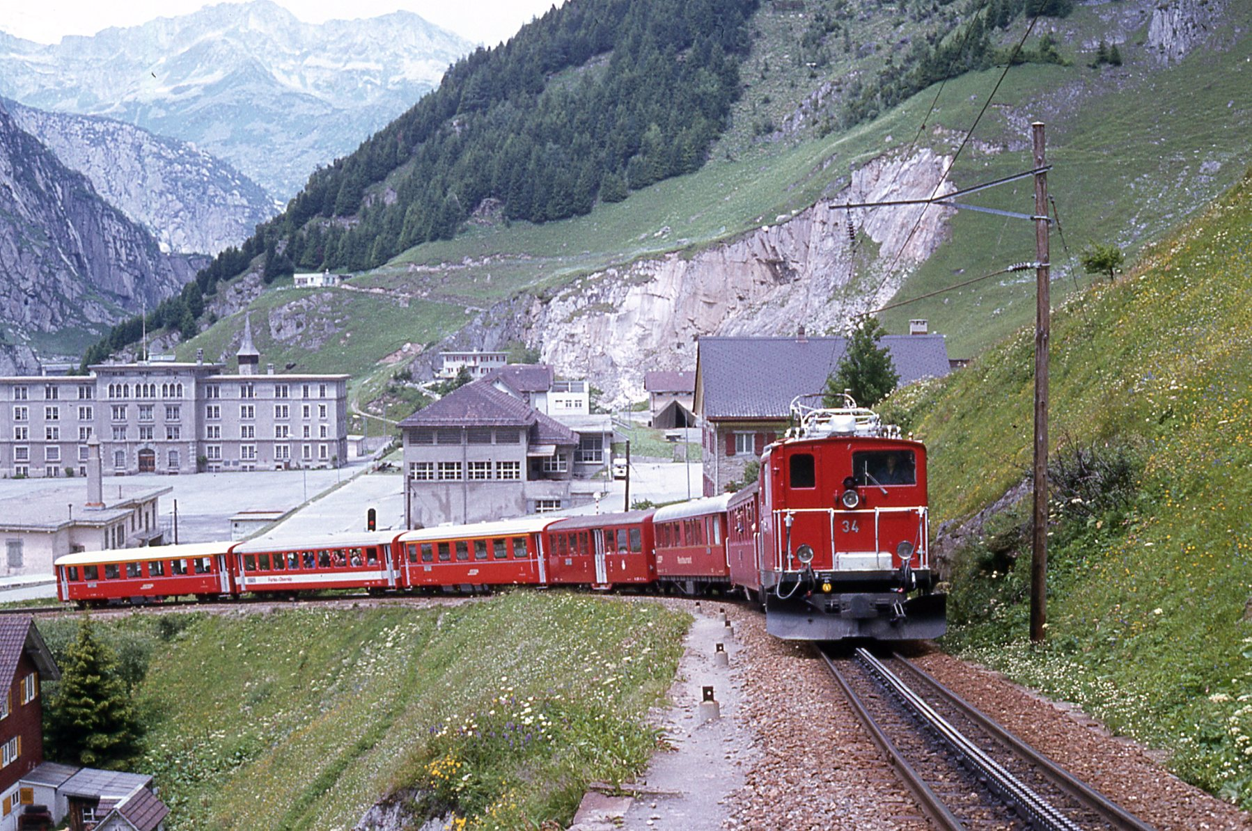 Le Glacier-Express, tiré par la HGe 4/4 I 34 du Furka–Oberalp-Bahn, quittant Andermatt pour Disentis prise dans les années 1980.